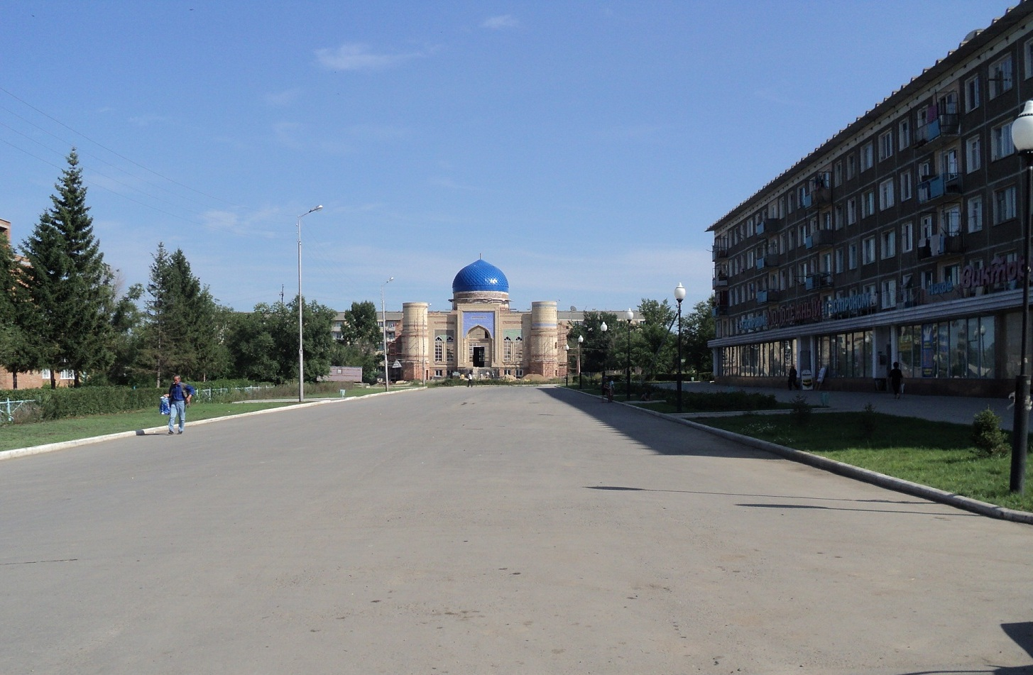 Центр Молодежного. Мечеть (еще строится).